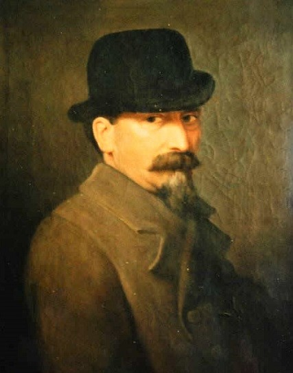 Ritratto dell'ingegner Vittorio Zannoni, olio su tela, 62 x 51 cm., coll. privata